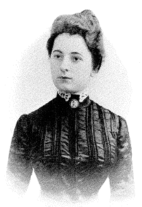 Анна Ивановна Проханова (девичья фамилия Казакова) - супруга Ивана Степановича Проханова (1869—1935) — российского религиозного деятеля и поэта. Лидера движения евангельских христиан.